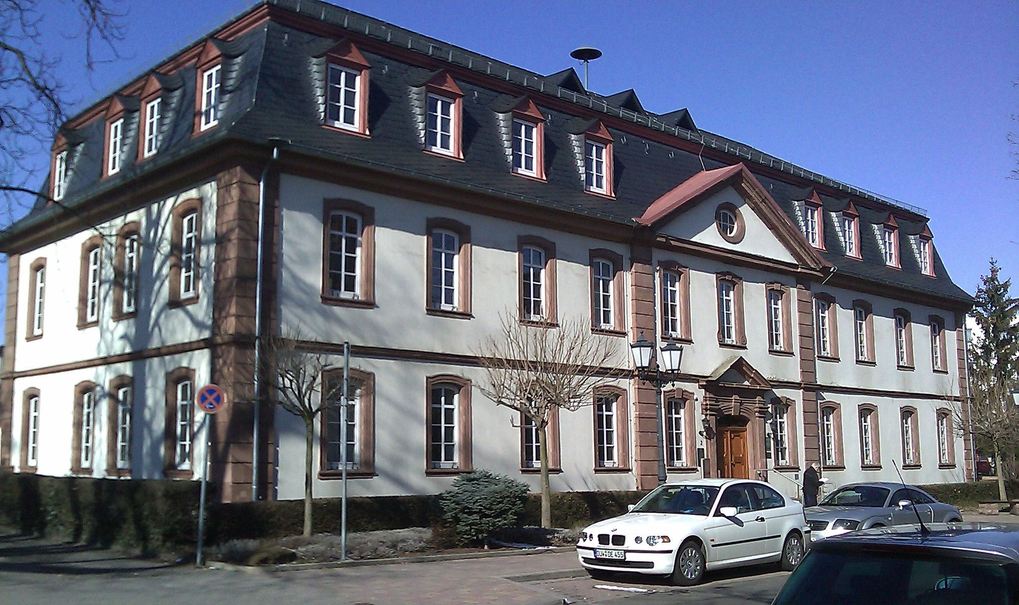 Ehem. Distrikrkrankenhaus, jetzt Rathaus